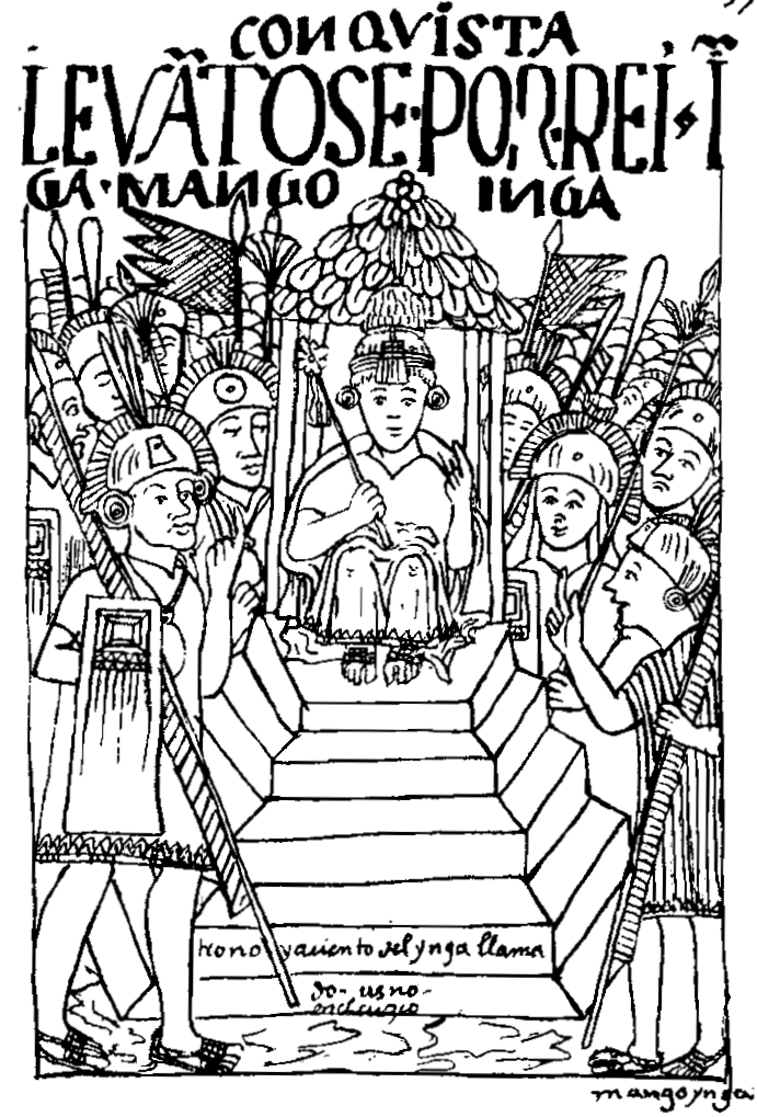 Dibujo de Guamán Poma de Ayala, que representa al inca Manco Inca Yupanqui sentado en su trono o usno.